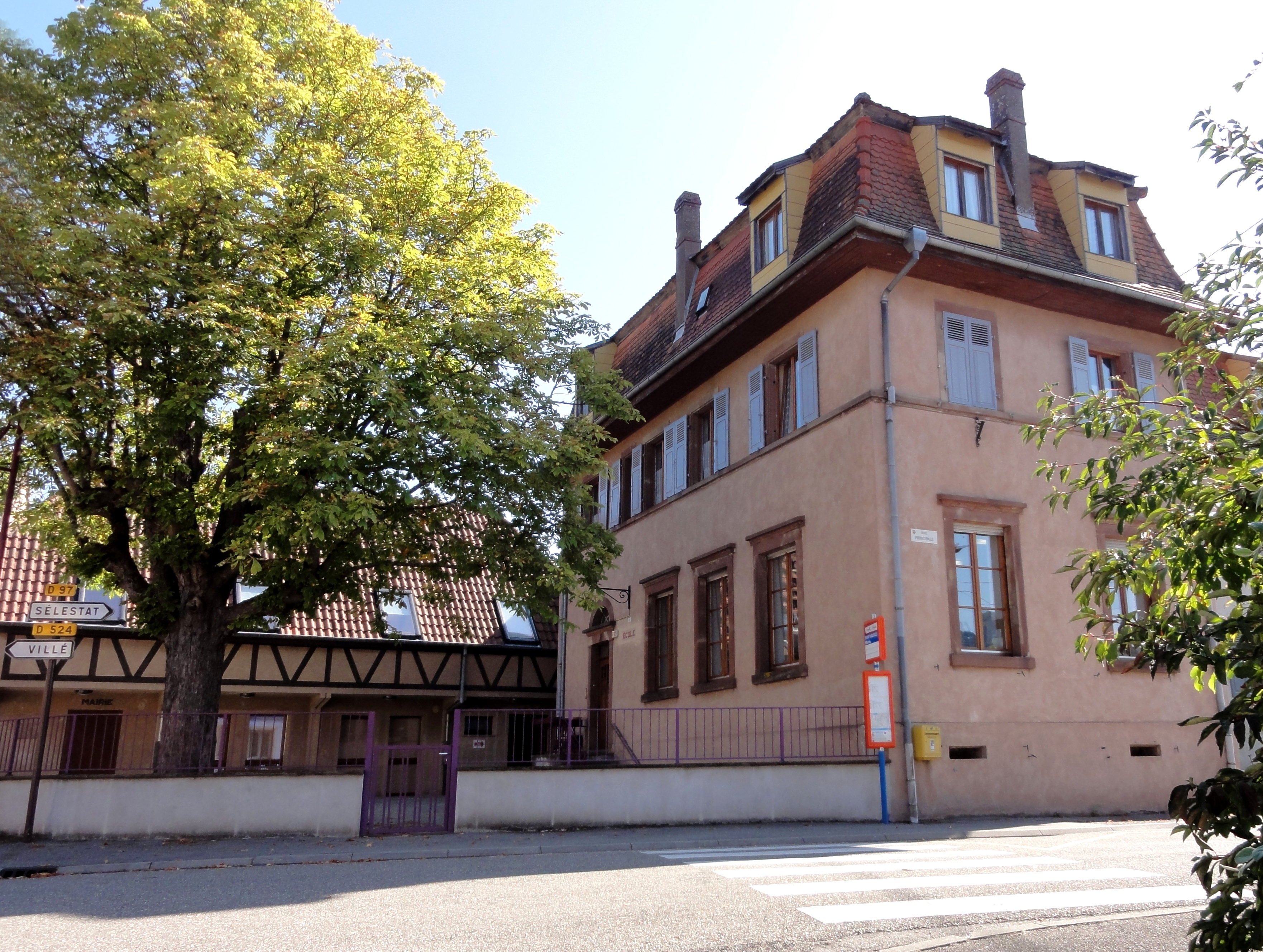 Alsace, Bas-Rhin, Saint-Maurice, Église Saint-Maurice, Mairie-école.